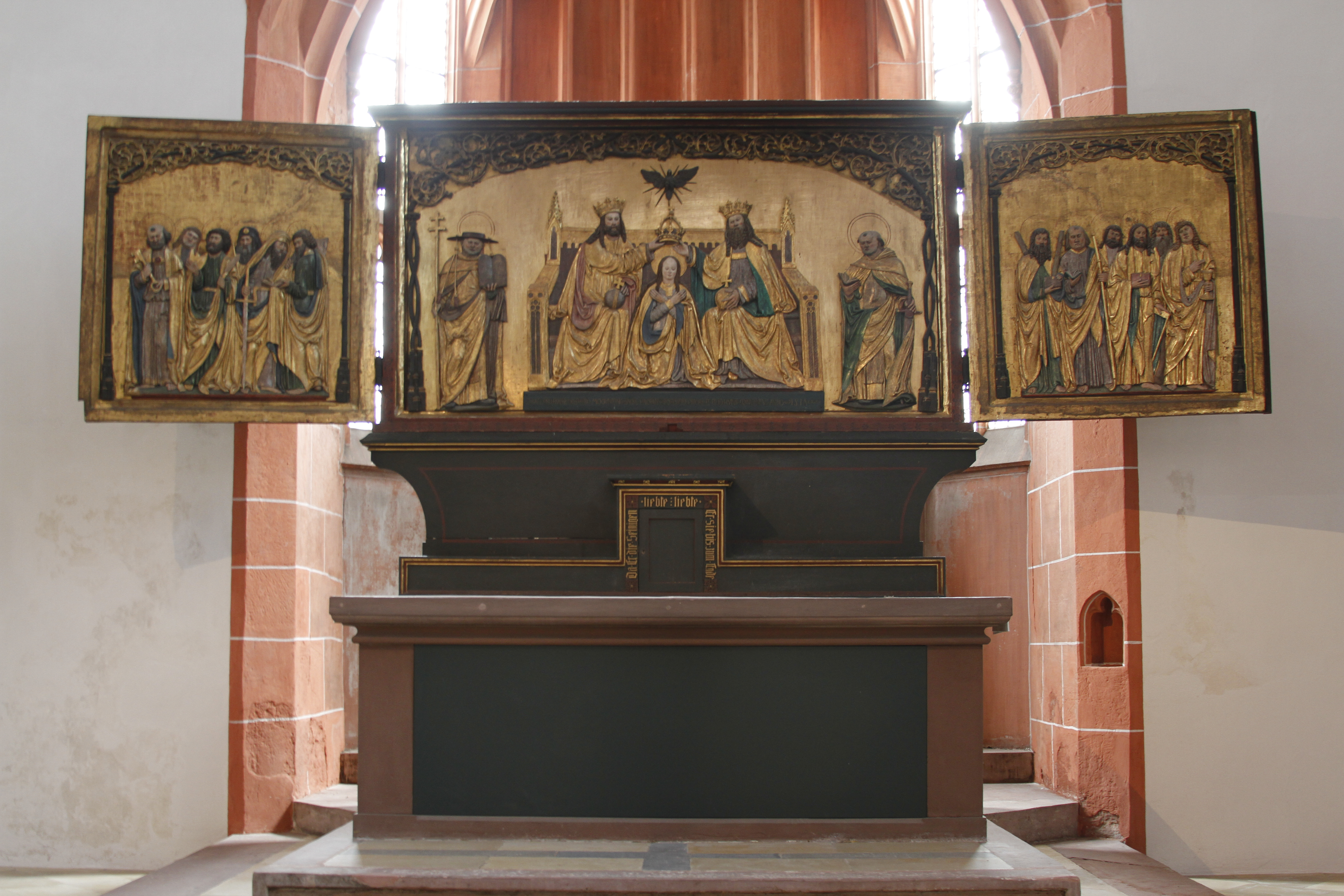 Karmeliterkirche - Mainz - Germany